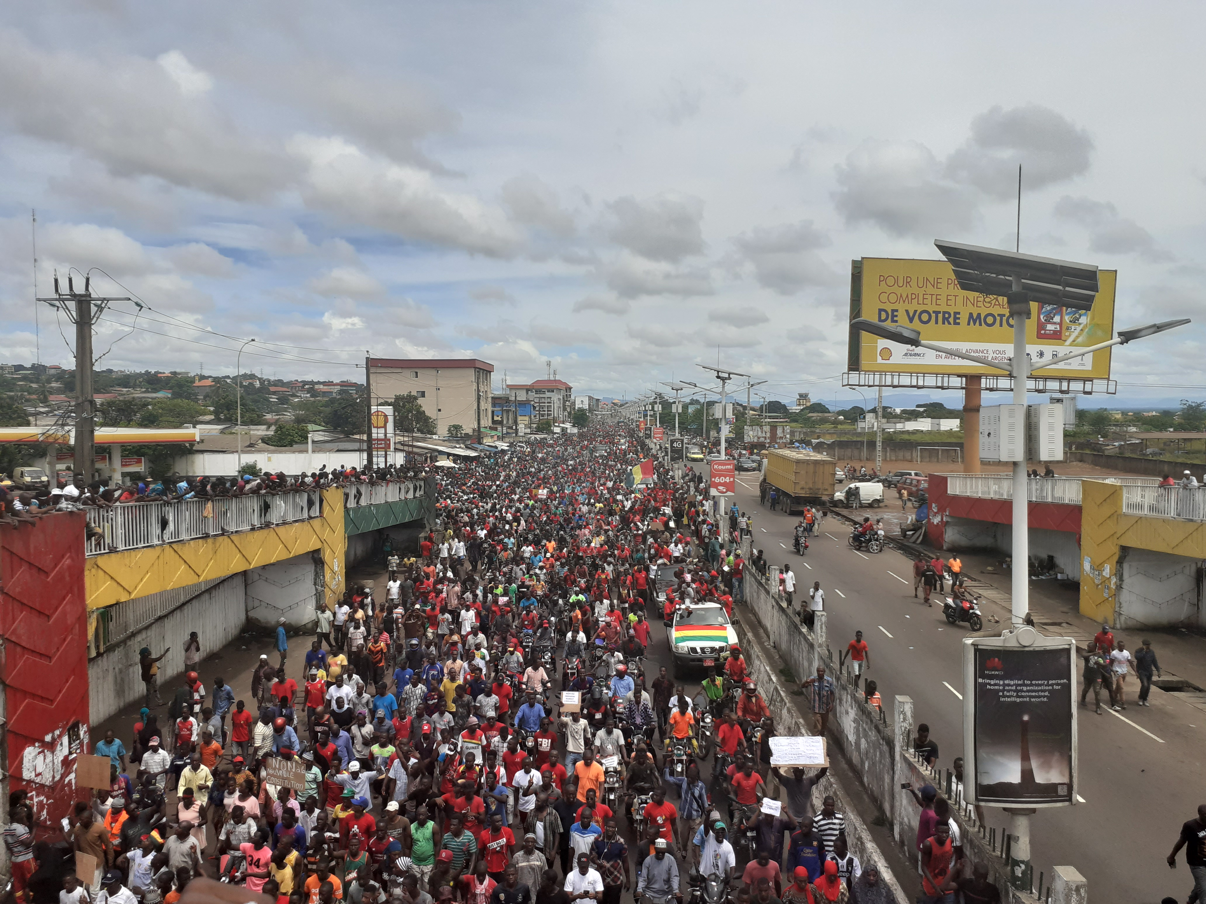 Manifestation du FNDC le 24 octobre à Conakry